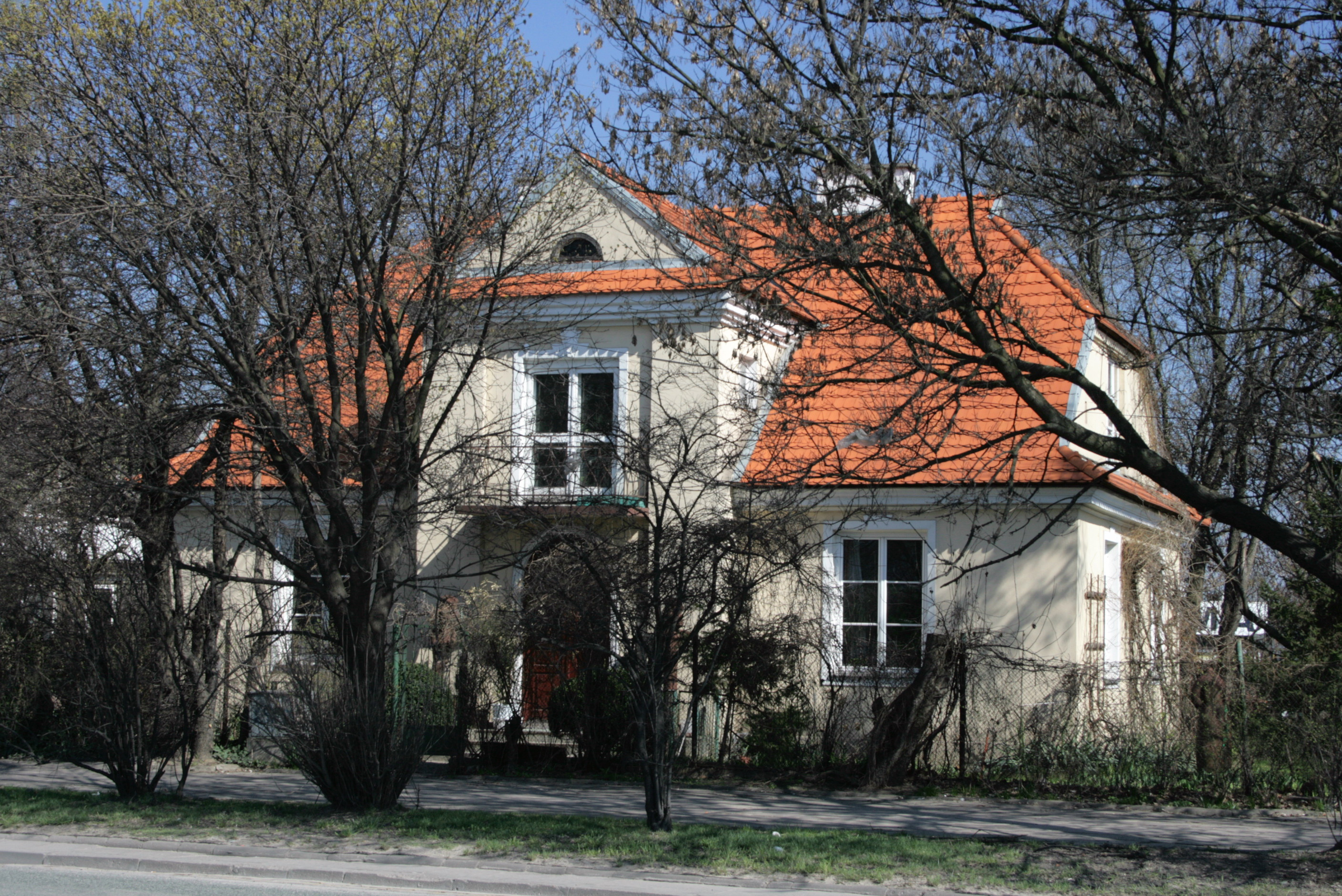 Willa Podgórskich przy ul. Powsińskiej 104 w Warszawie